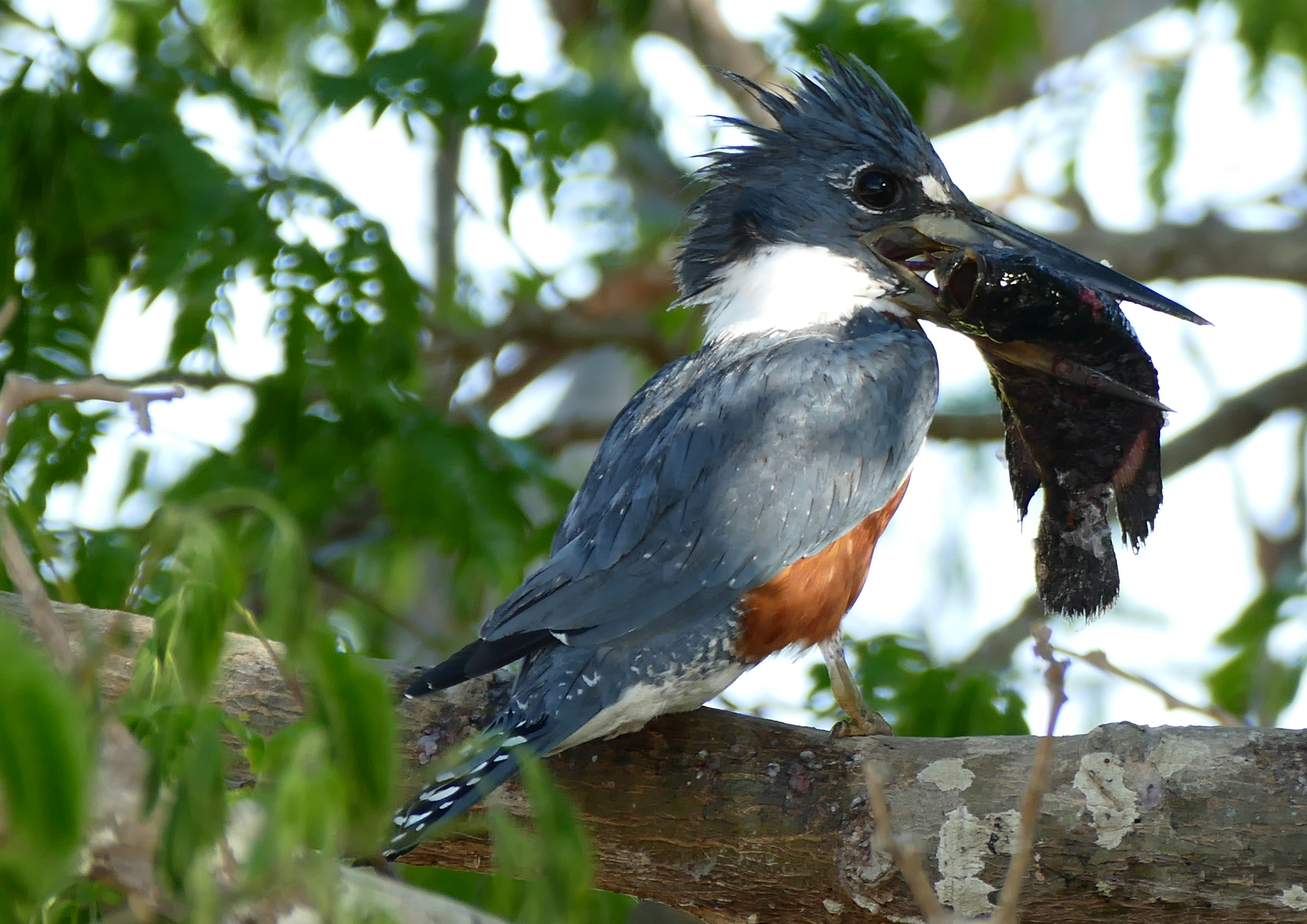 Transpantaneira, Poconé, Mato Grosso, BRAZIL